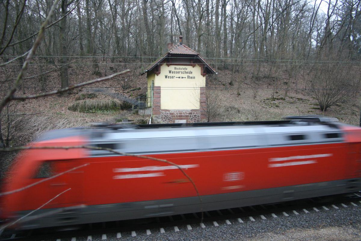 ehemalige Blockstelle Wasserscheide Rhein-Weser an der Main-Weser-Bahn zwischen den mittelhessischen Städten Neustadt und Stadtallendorf.